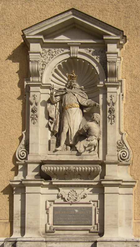 Heinrich II. Jasomirgott (1107-1177), Außenseite des Schottenstiftes in Wien; Henry II of Austria, monument in Vienna